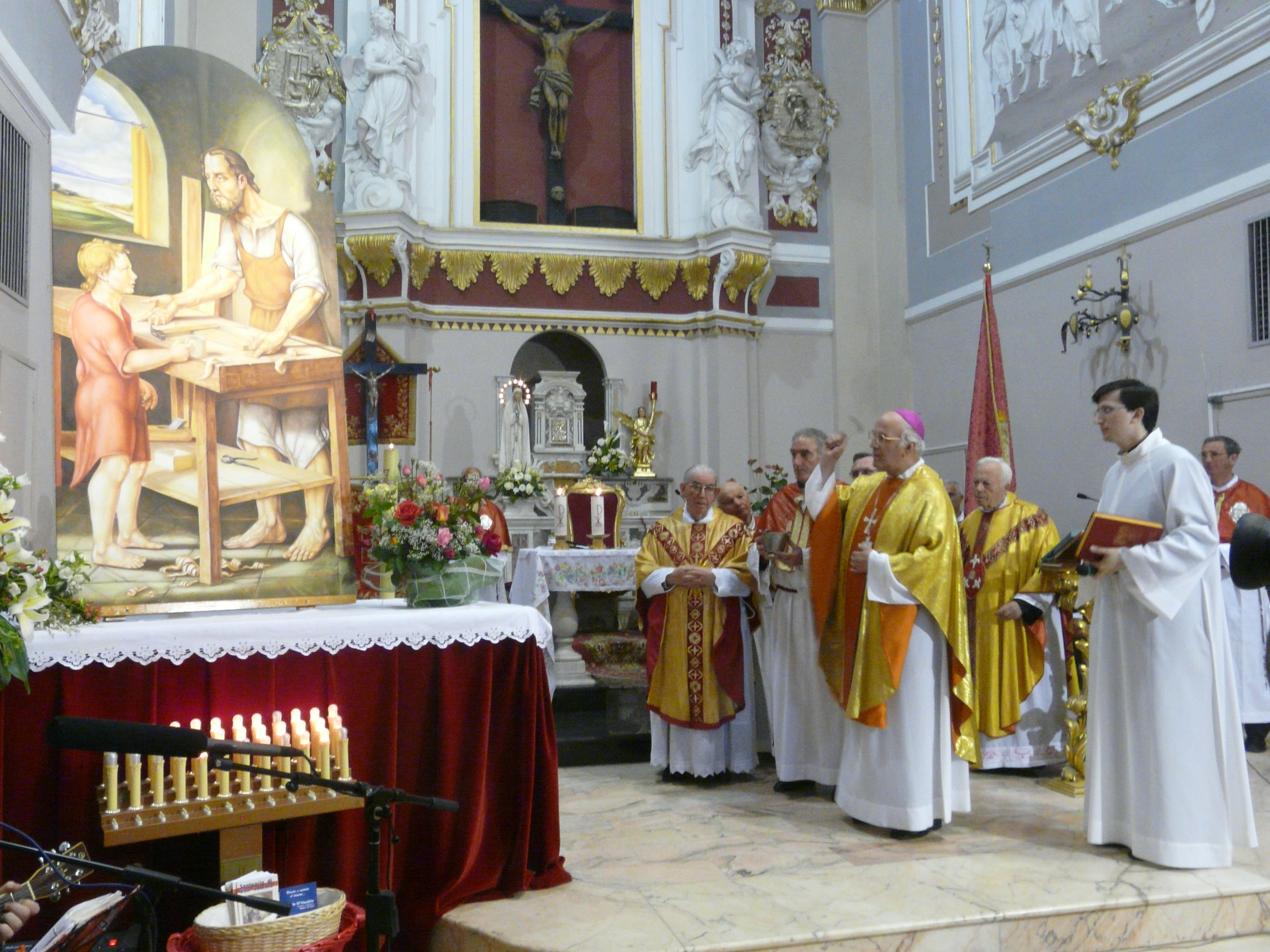 Arcivescovo GIUSEPPE MOLINARI benedizione dell'opera San Giuseppe Lavoratore del pittore abruzzese CESARE GIULIANI Vasto (CH) 01-05-2008